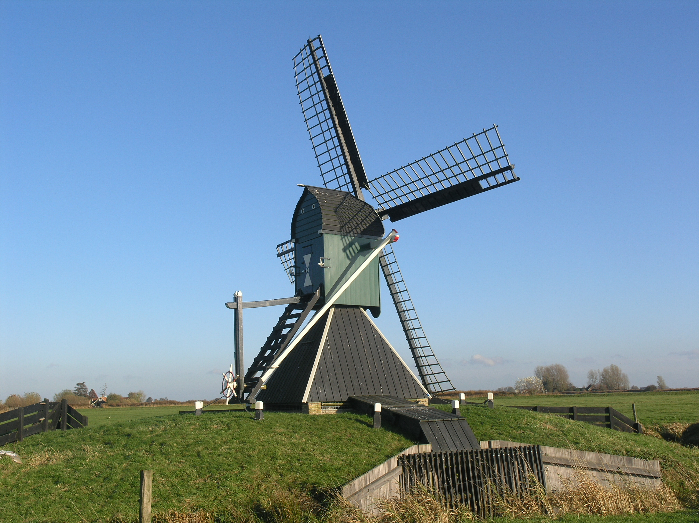 Grouw Spinnekopmolen De Bird